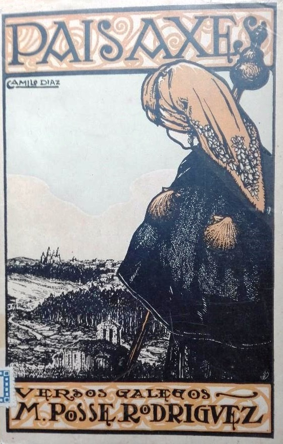 Paisaxes de Manuel Posse Rodríguez